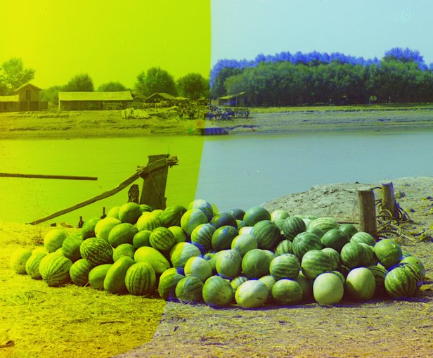 Sabirabad(Petropavlovka).Qarpızların Kür çayı boyunca idxal olunması